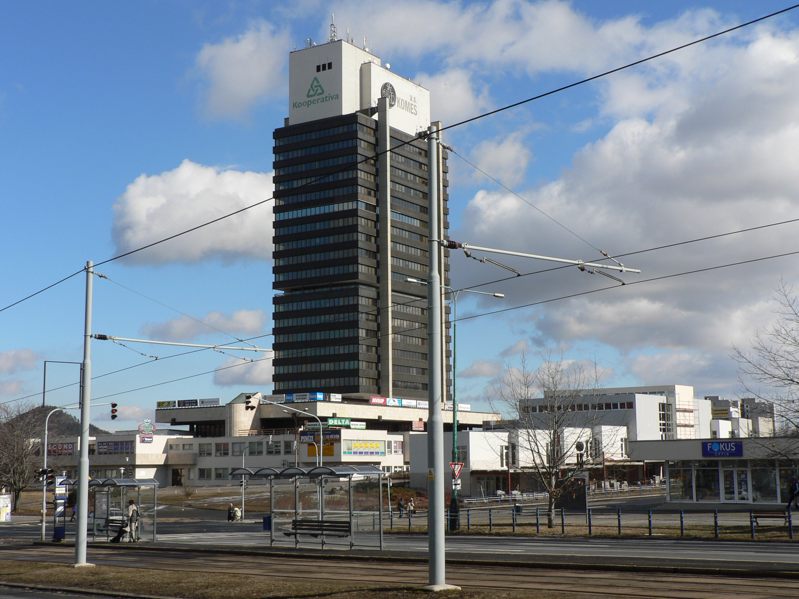 Budova SHD Komes v Mostě.